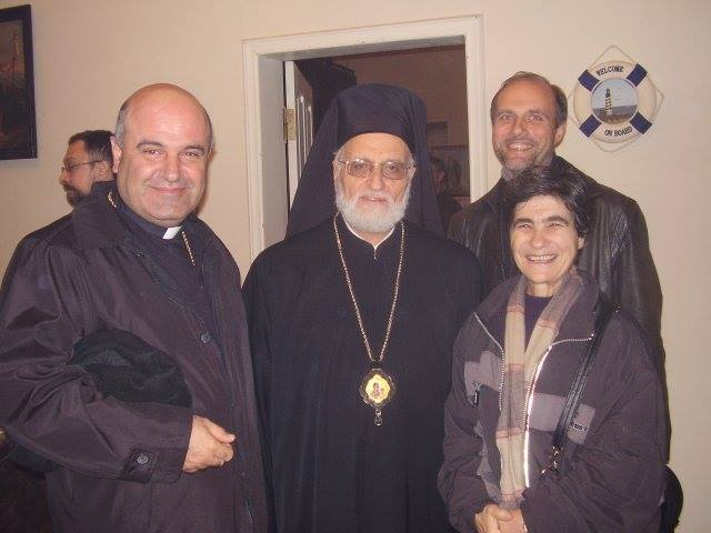 Патриарх Мелькитской церкви Григорий III Лахам в Санкт-Петербурге в 2005 г., справа монахиня Тереза Анакри